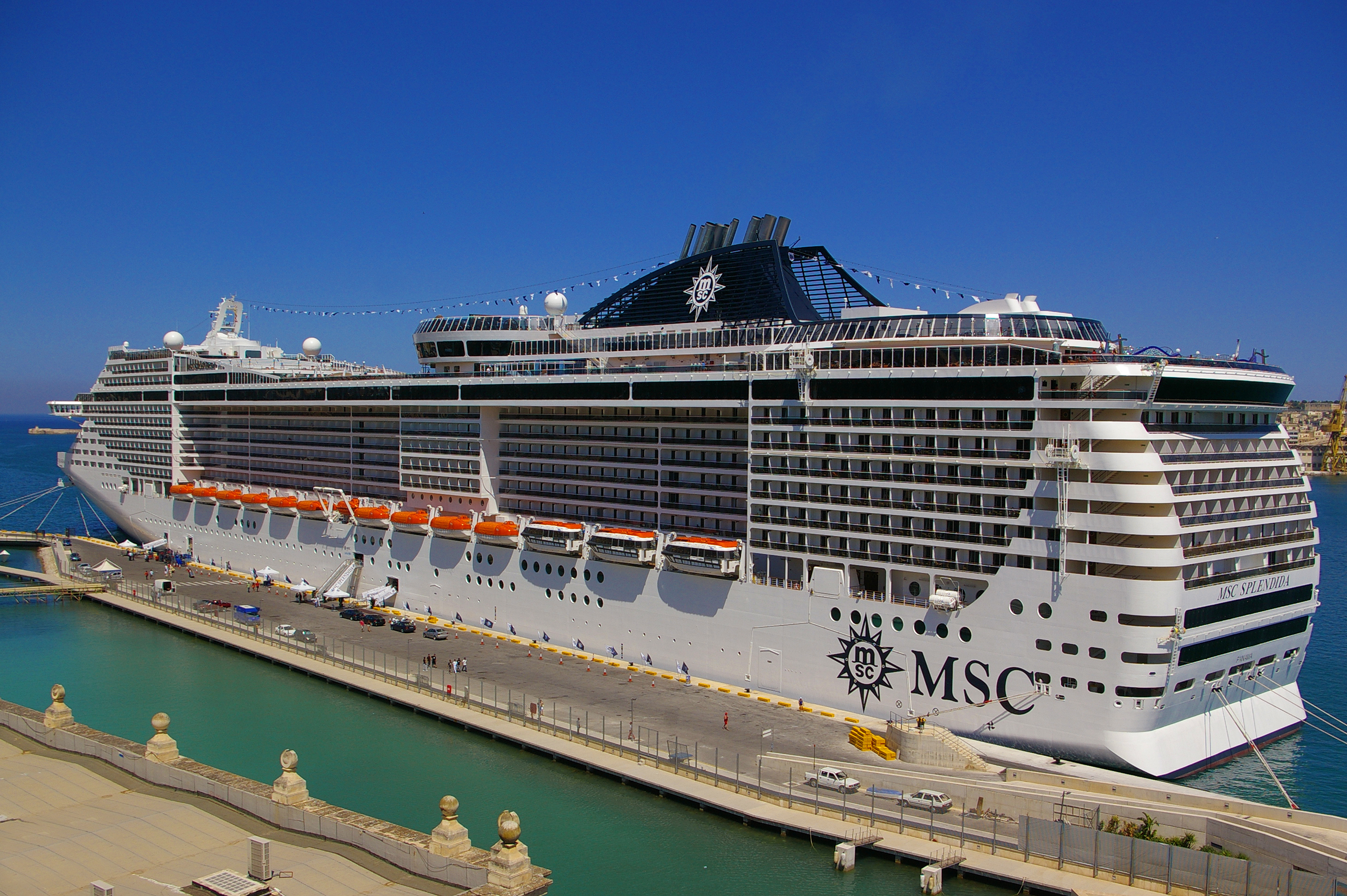 MSC Splendida